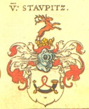 Coat of Arms, Staupitz Family, Meissen Saxony (from: Johann Siebmacher: New Wappenbuch, scan from: Horst Appuhn, Johann Siebmachers Wappenbuch. Die bibliophilen Taschenbücher 538, 2. verb. Aufl , Dortmund 1989 Meißner, Blatt 151)